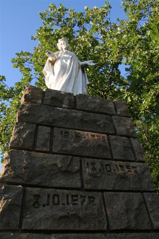 La Vierge Hailbat dans les bois près de Jaulny